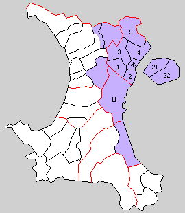 後の鹿児島県鹿児島郡域の町村制時点の町村。